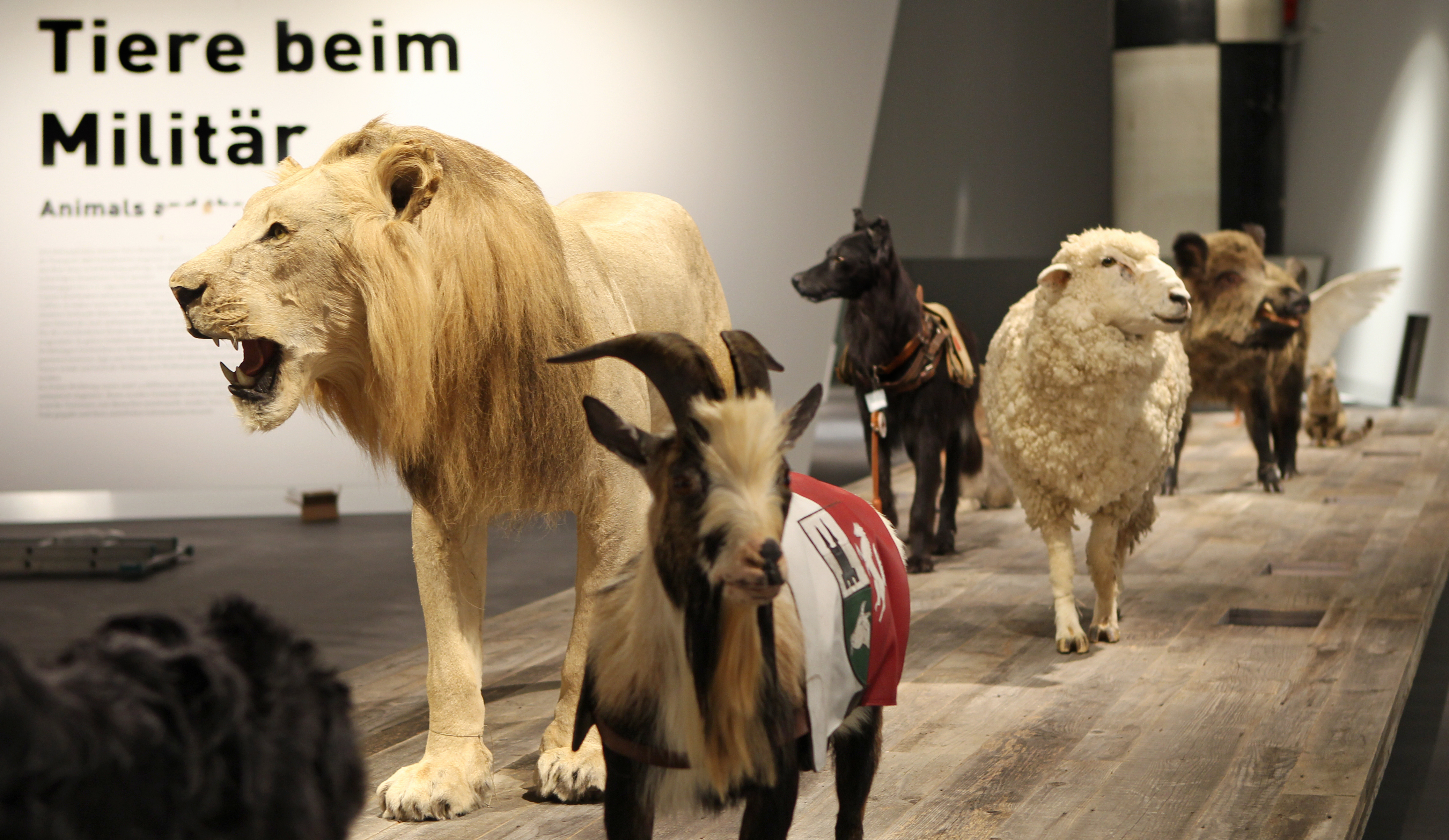 Im Neubau des Militärhistorischen Museums werden Ausstellungsstücke nach übergeordneten Themen in größere Sinn-, Erfahrungs-und